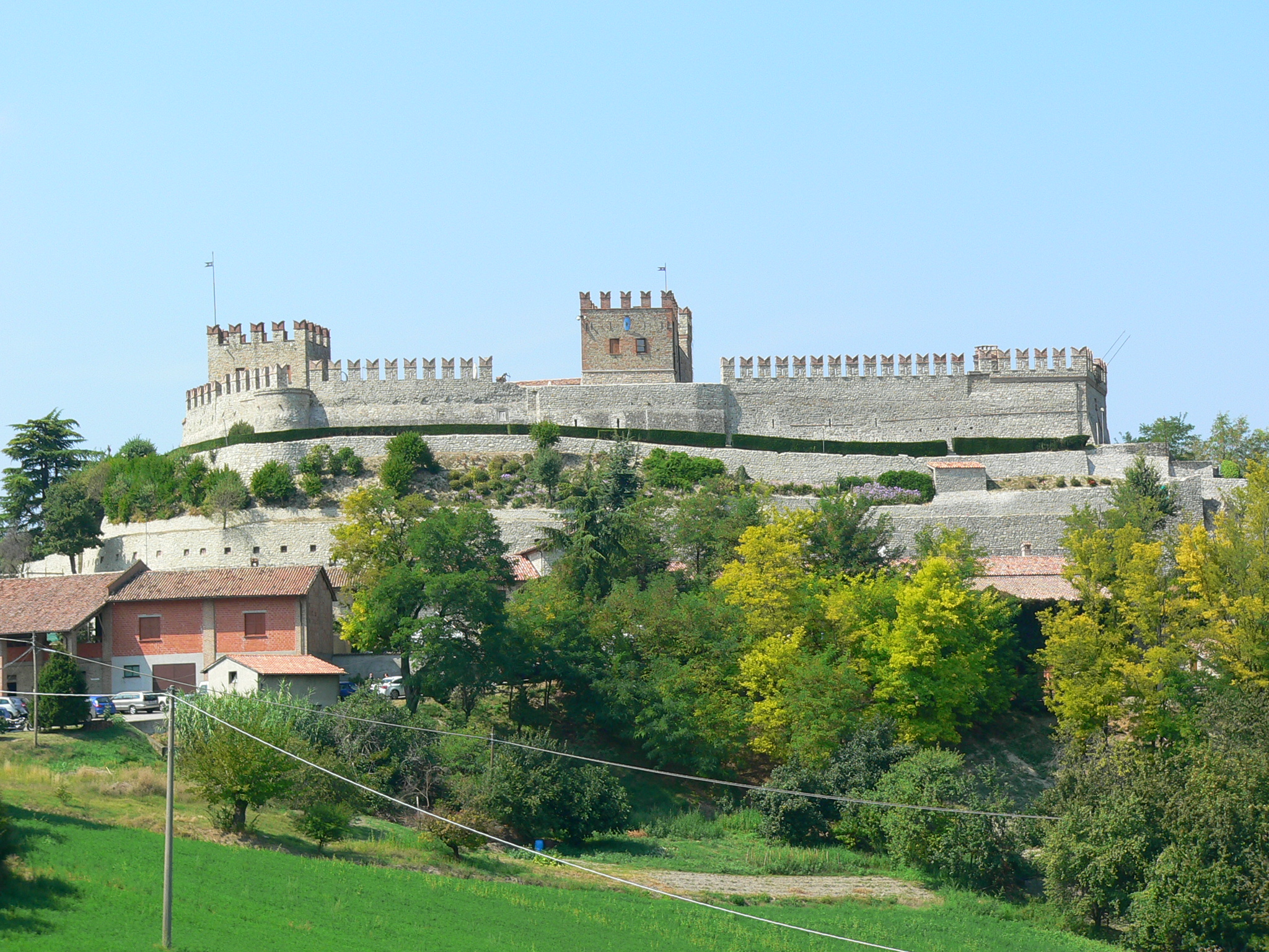 Il castello di Montesegale